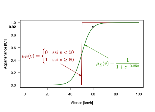 Illustre le degré d'appartenance d'un élément à un sous ensemble flou